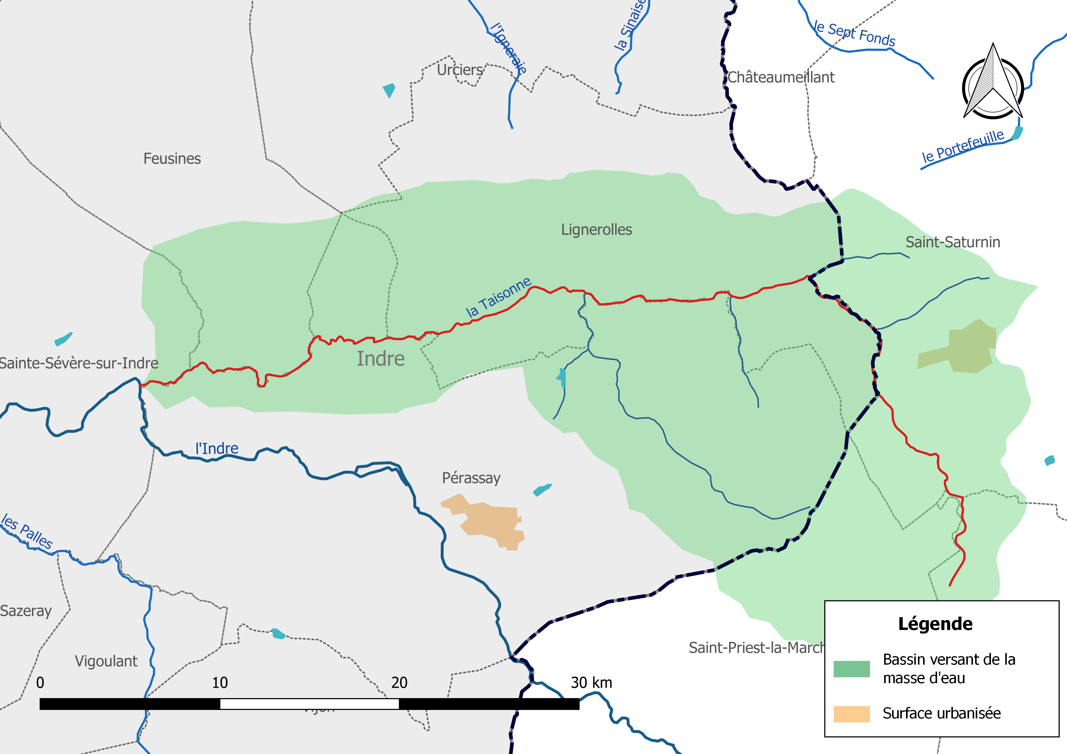 Carte de la masse d'eau « FRGR1474 », avec mise en exergue du cours d'eau « la Taisonne » (en rouge).